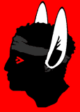 Midasz